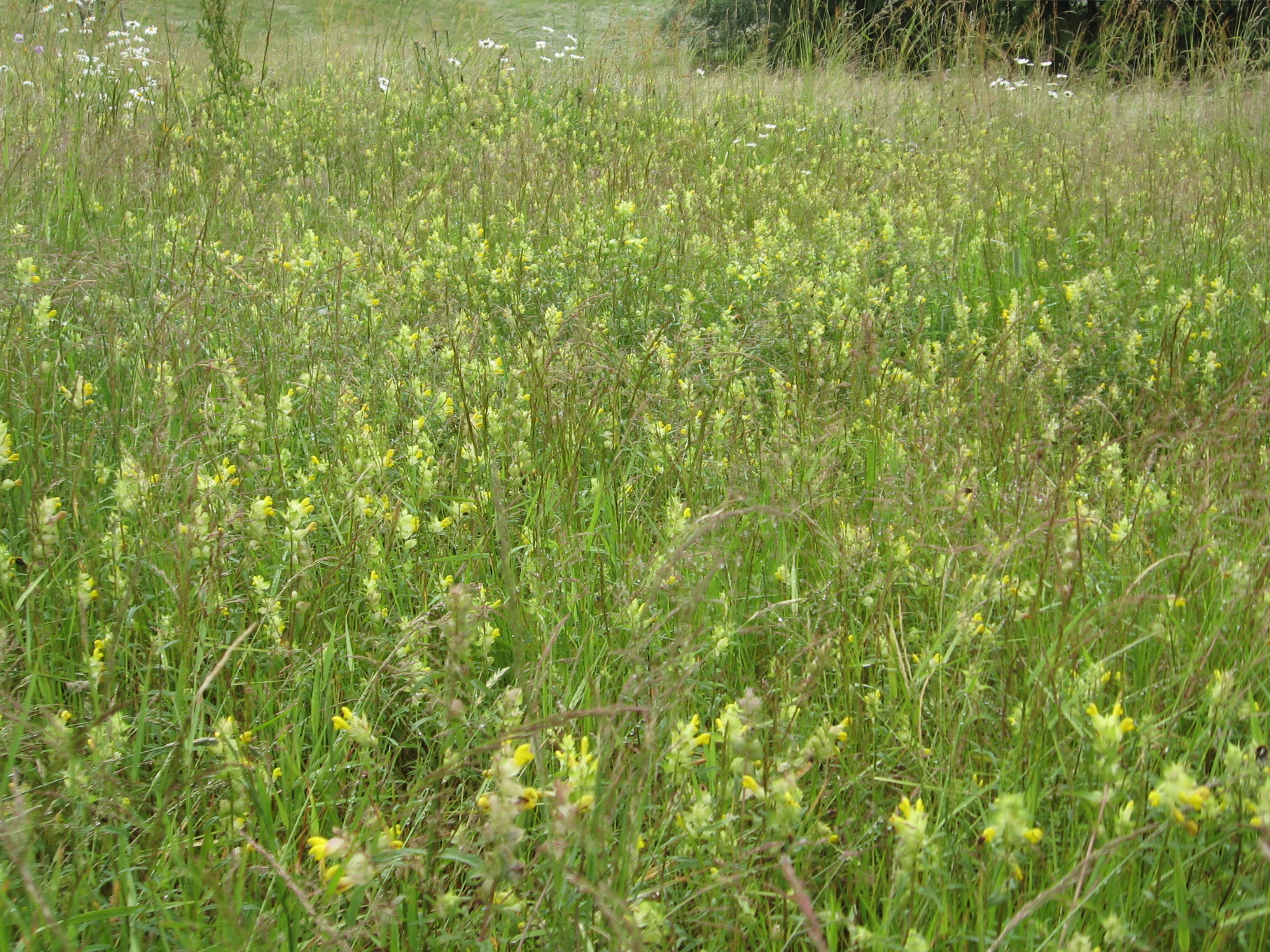 Vermutlich Großer Klappertopf (Rhinanthus angustifolius) im Landschaftsschutzgebiet Westfalenhang.